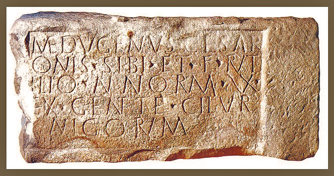 Lábana de Medugeno de la xente de los Cilurnigos atopada'n Xixón